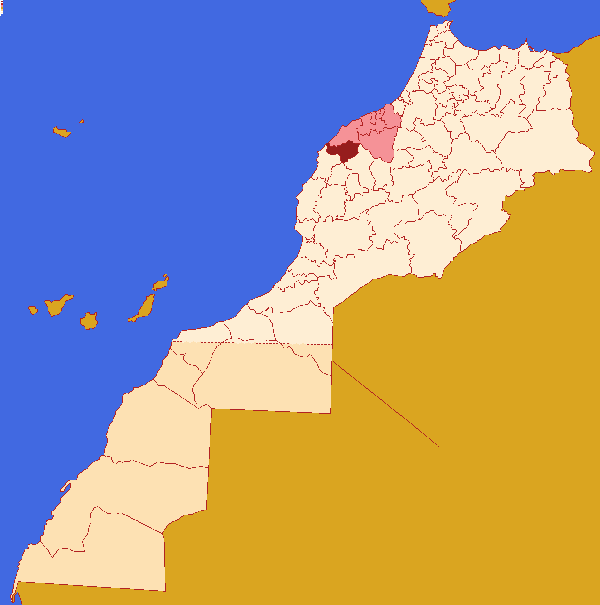 Localização da província de Settat , dentro da região de Casablanca-Settat e dentro de Marrocos. Conforme a reforma administrativa de 2015.